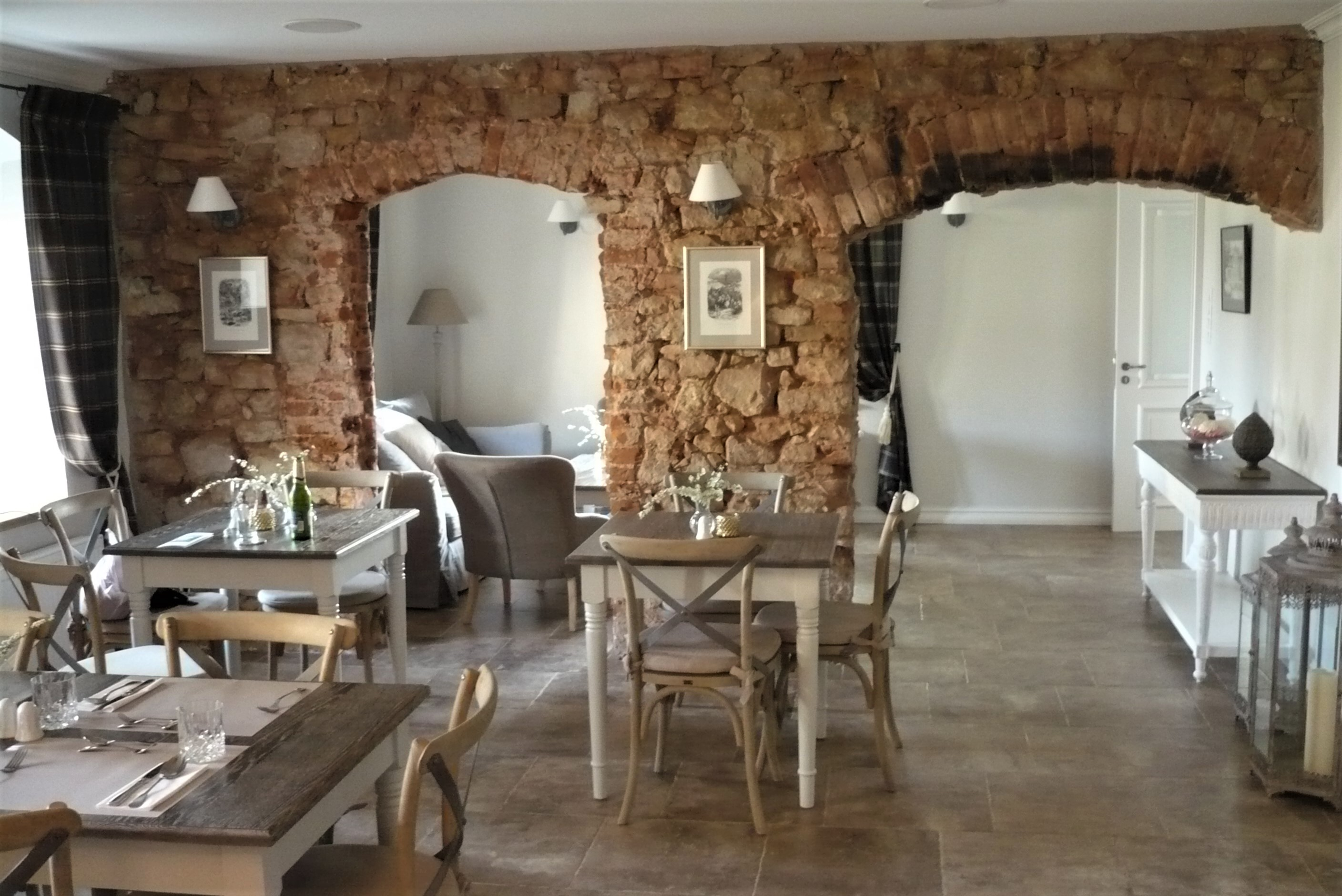 Kamieniec.Kawiarenka